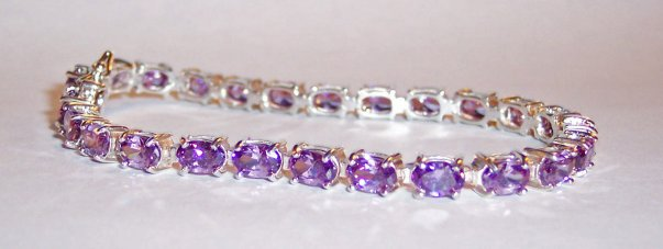 A Tanzanite bracelet.